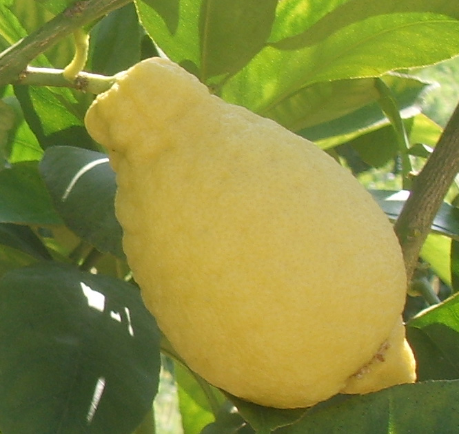 Parco di Villa Reale di Castello (Villa di Castello) Collection of citrus (collezione di agrumi rari)in Florence, italy in Florence, Italy